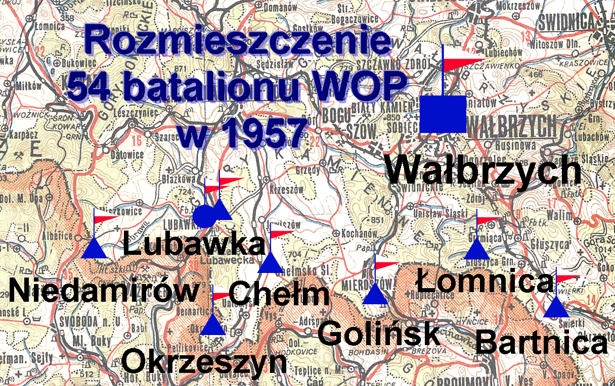 Rozmieszczenie 54 batalionu WOP w 1957